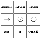 таблица порядка слов ВСО